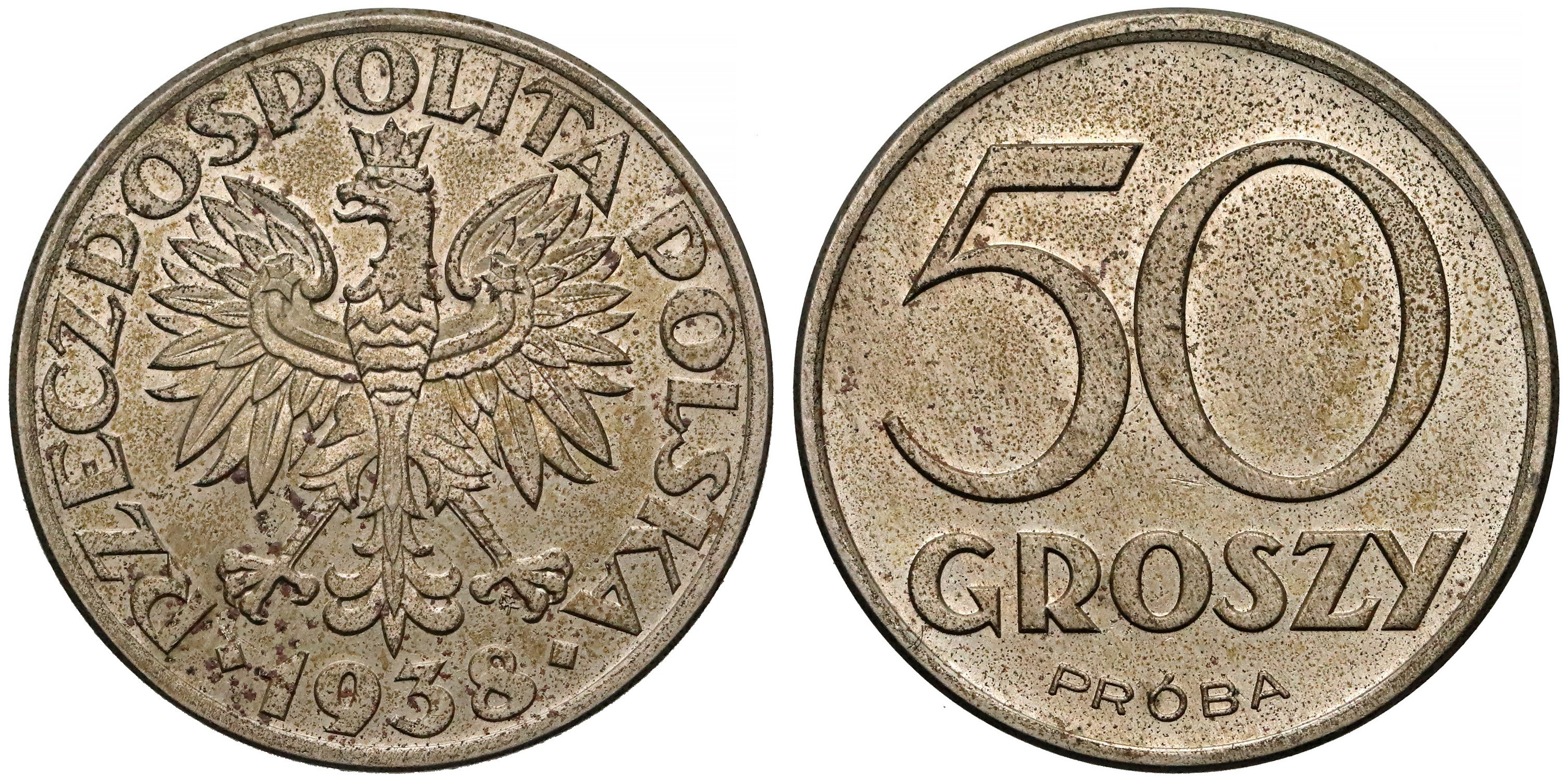 PRÓBA 50 groszy 1938 duże cyfry 50 CuNi